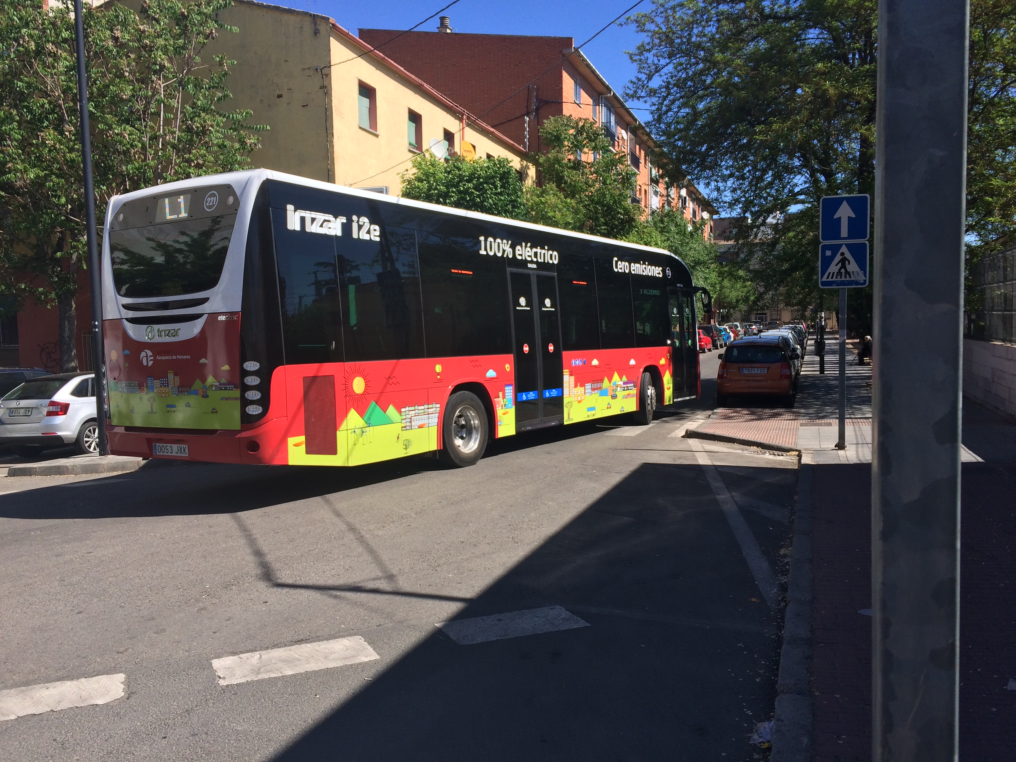 Azuqueca de Henares - Dos nuevos autobus incorporados a su línea de transporte moderno, uno es el modelo 100% eléctrico de Irizar, y el otro es un MAN Lion´s City Híbrido, tienen una longitud de 12 metros, piso bajo y rampa para PMR manual y automática.